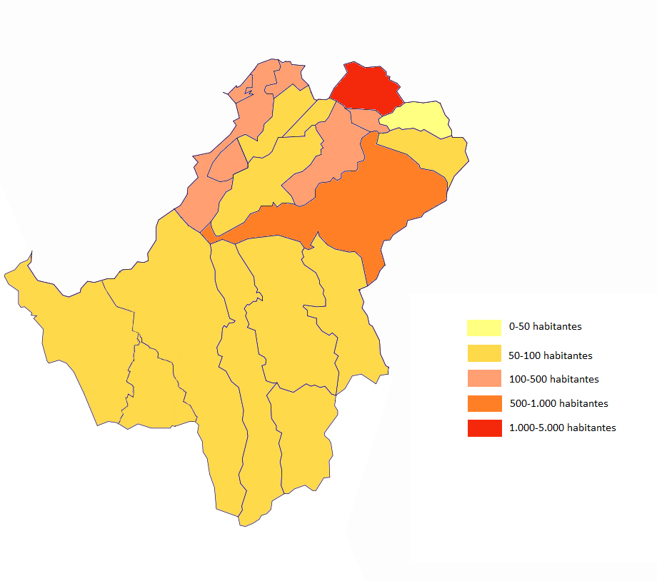 Demografía Comarca Anguiano 2015